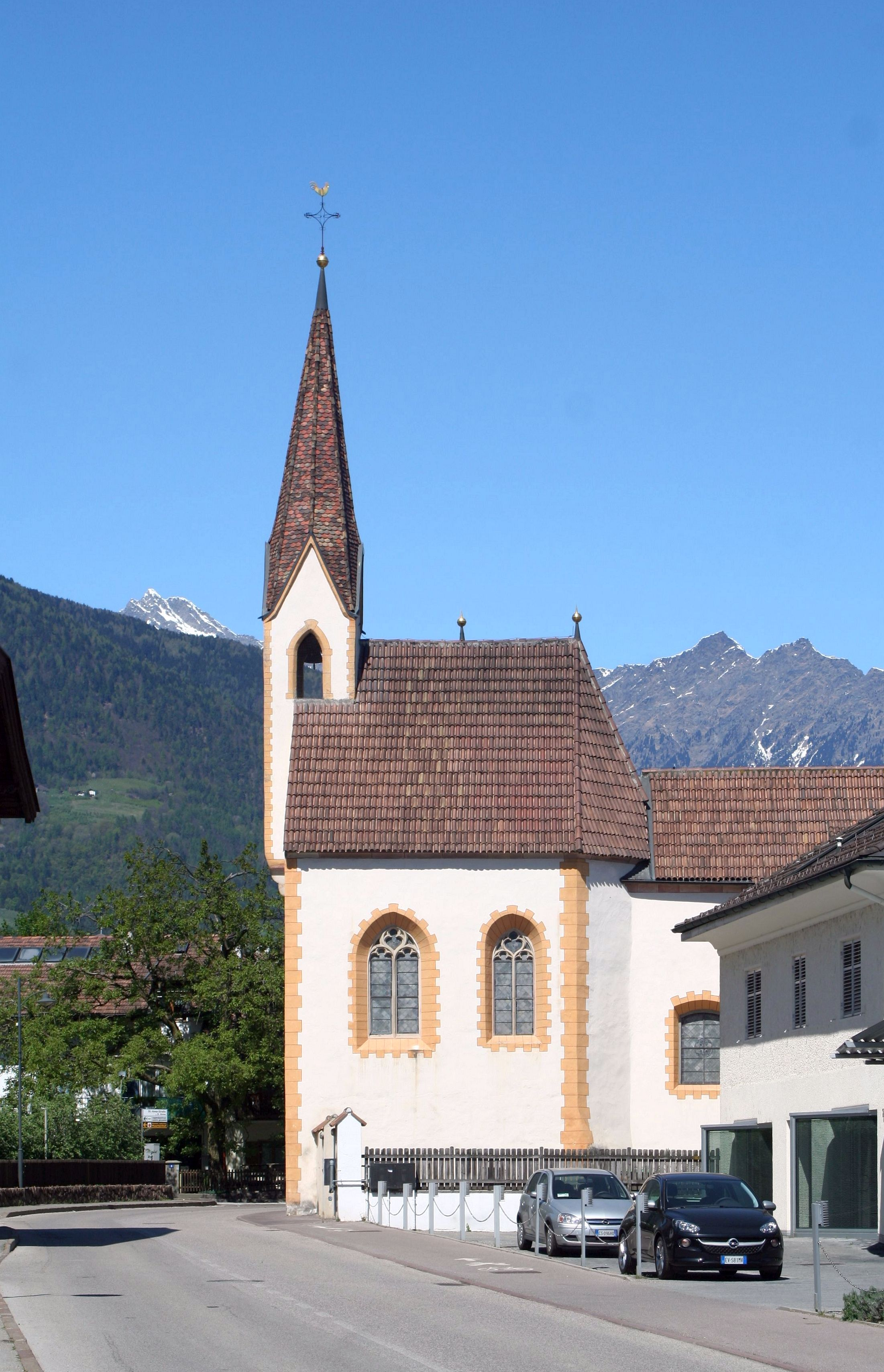 Annakapelle in Lana (Südtirol)